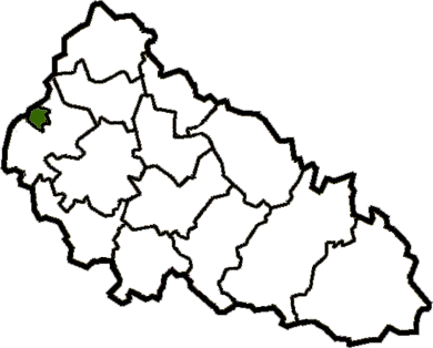 Uzhgorod-Raion map